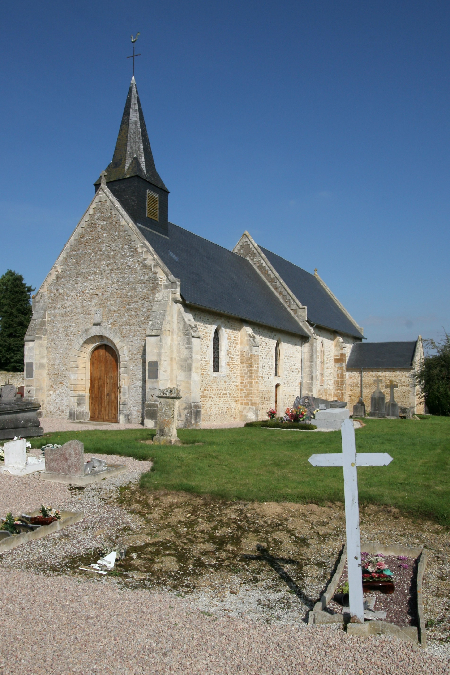 Église Saint-Cellerin à Meslay (Calvados, France).